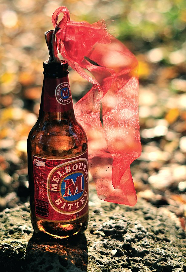 Molotov cocktail